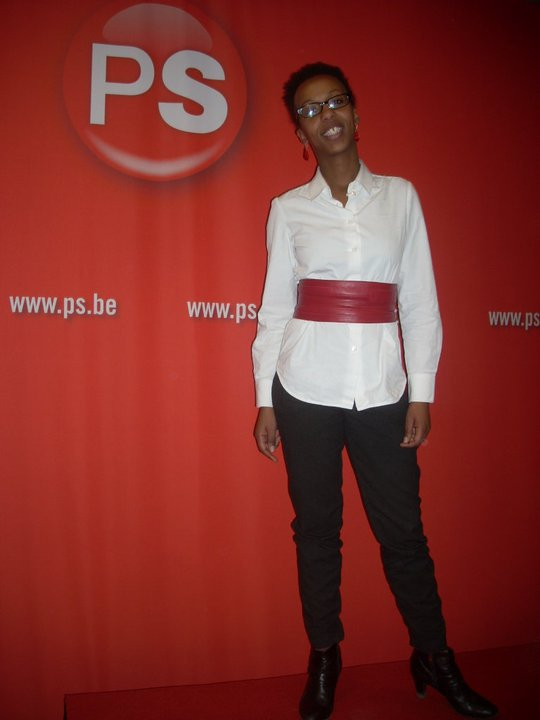 Joëlle KAPOMPOLE, membre du Parti Socialiste.